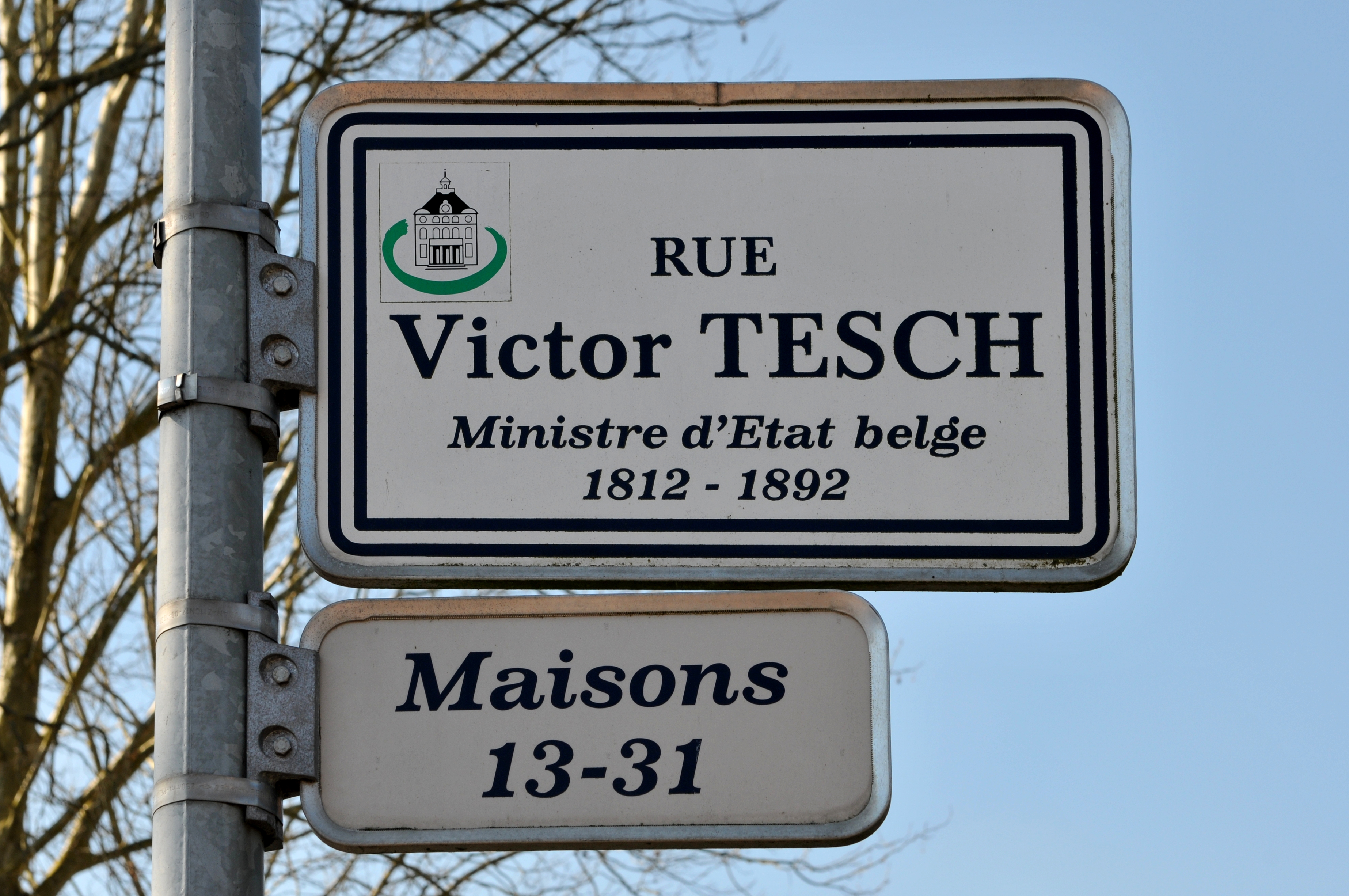 Stroosseschëld rue Victor-Tesch, am Brill zu Diddeleng.